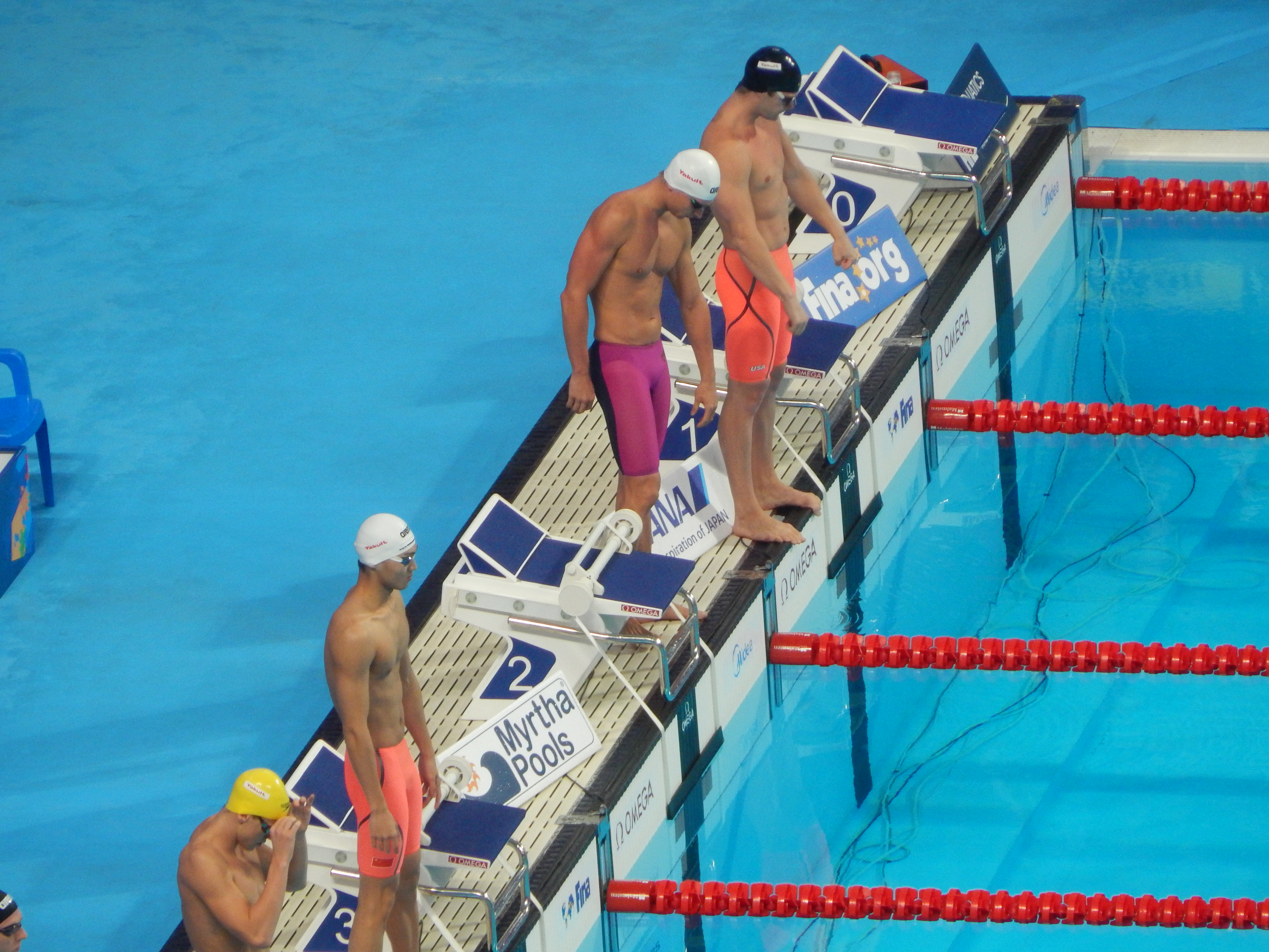 Перед финалом на 200 метров на спине в Казани на чемпионате мира